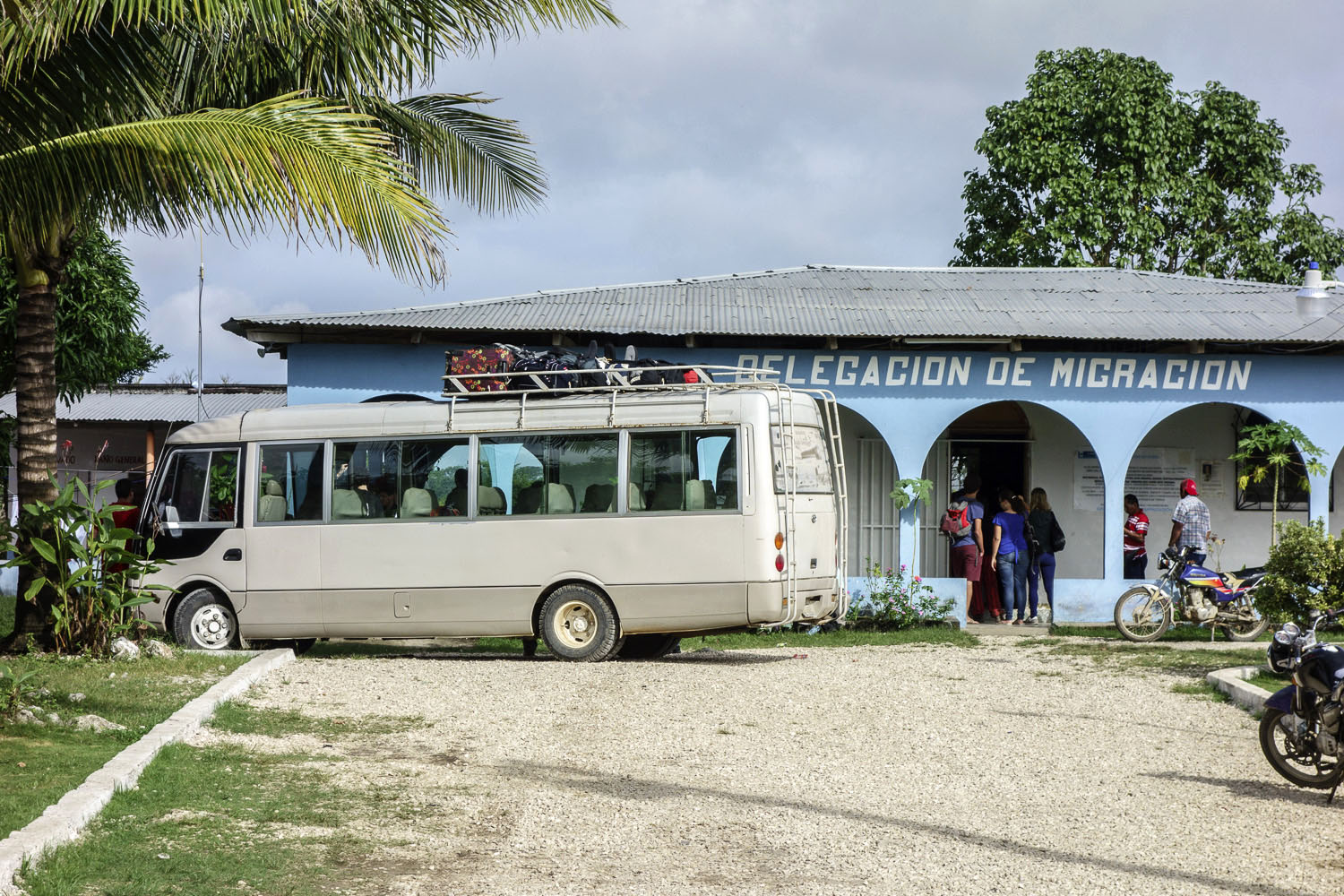 Migration cerca de La Tecnica, Guatemala